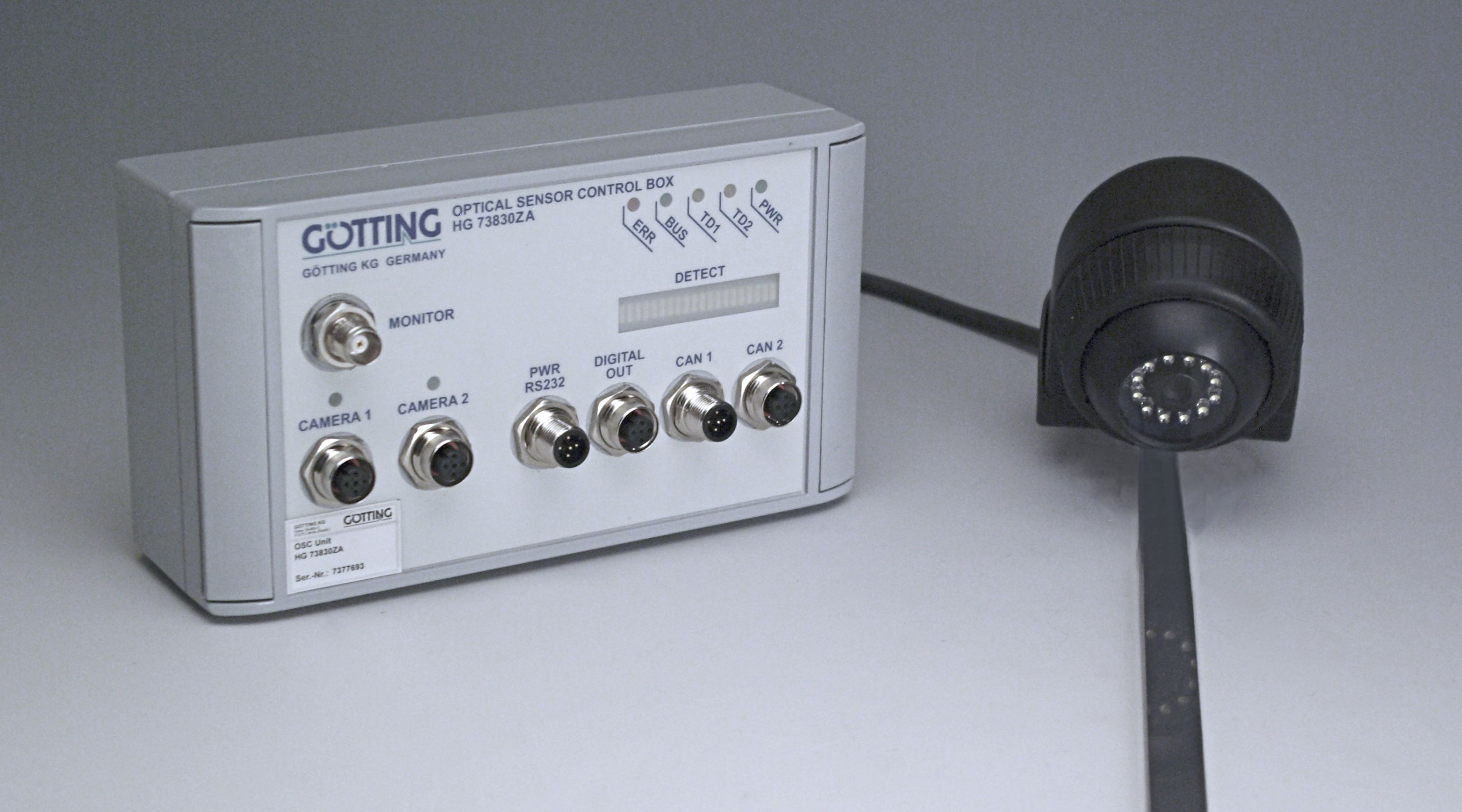 Komponenten für optische Spurführung mittels Farbkontrast: Auswerteeinheit zum Anschluss von bis zu zwei Kameras; Kamera + farbiger Streifen, der als Leitspur auf den Boden aufgebracht wird